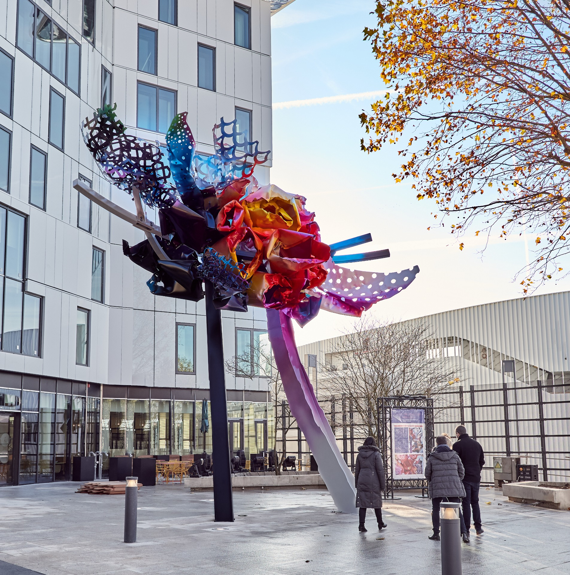 Inspired by an active romanticism, Arne Quinze continues his journey with this public sculpture ‘The Beautiful Dreamer’ in Paris to reshape our cities into a more human environment.